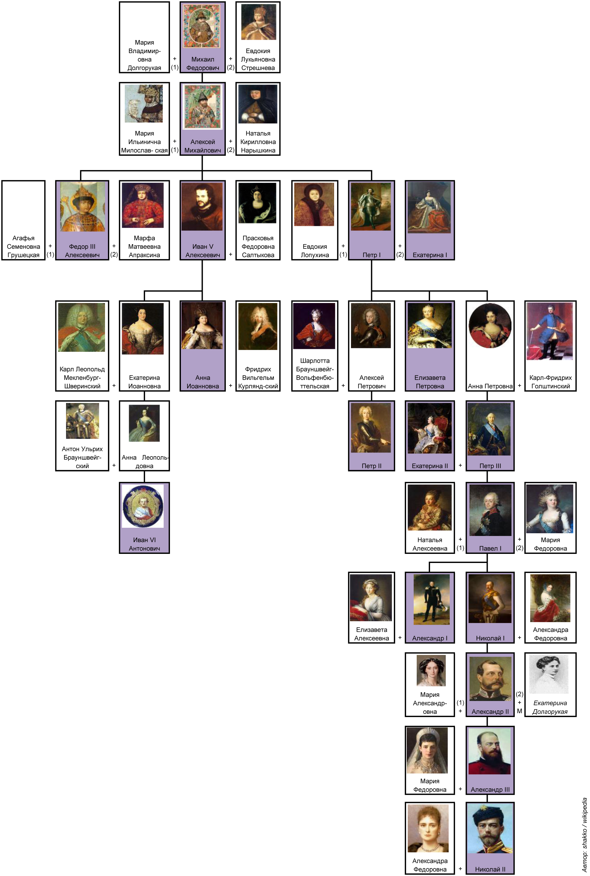 Генеалогическое древо дома Романовых